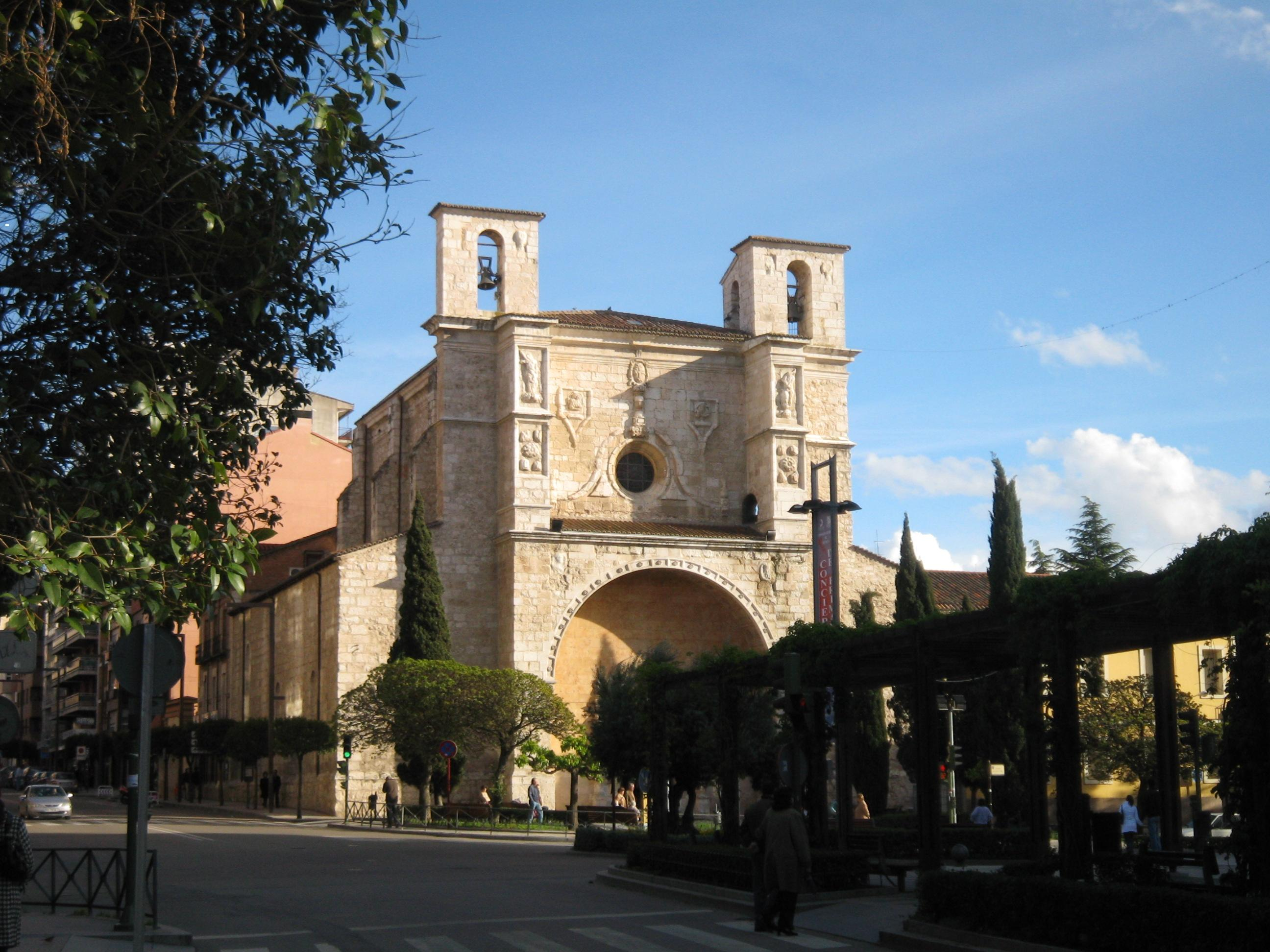 Iglesia de San Ginés in Guadalajara, Spain